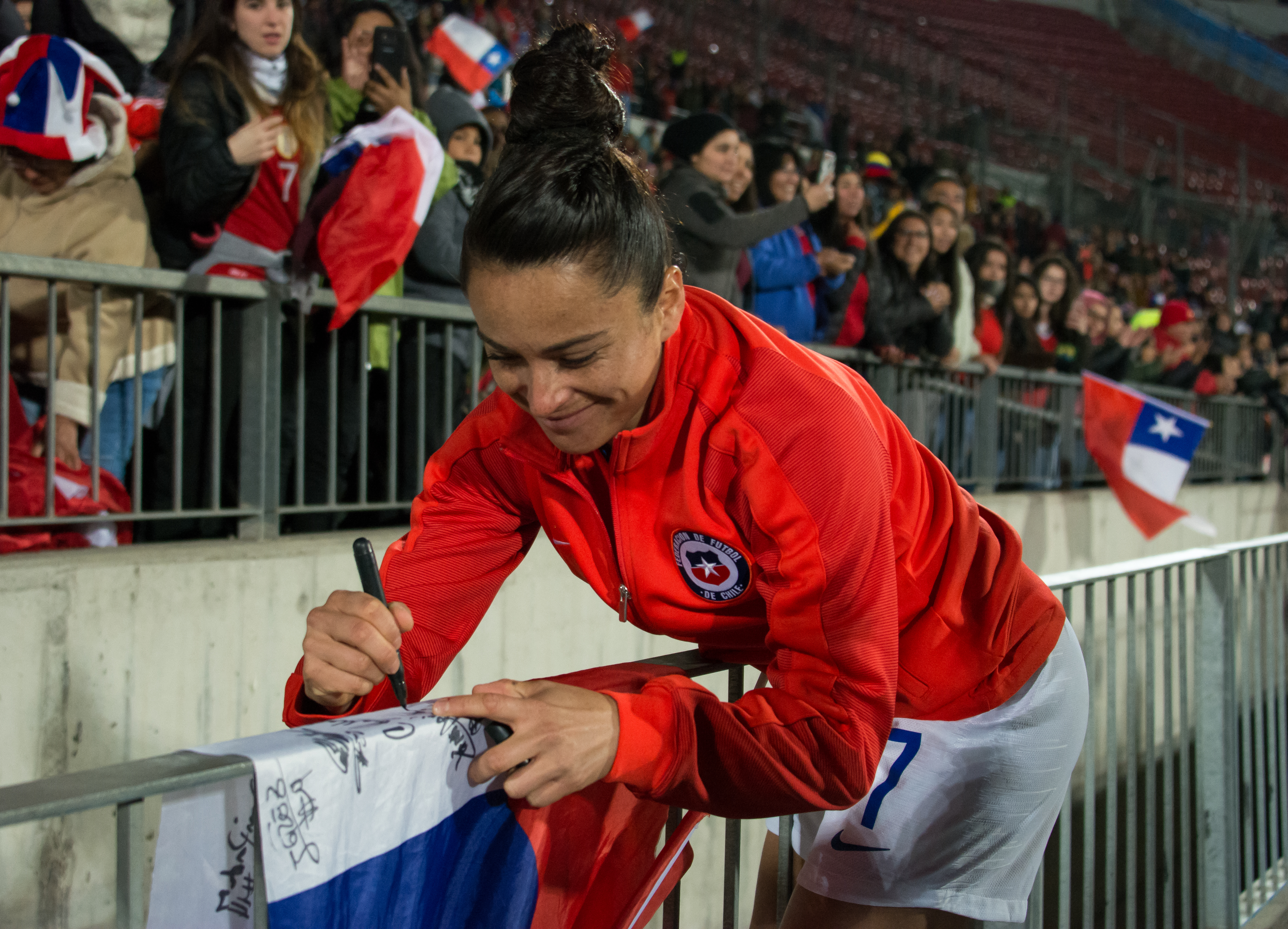 María José Rojas, Chile v Colombia, Estadio Nacional, Ñuñoa, Santiago, Chile.